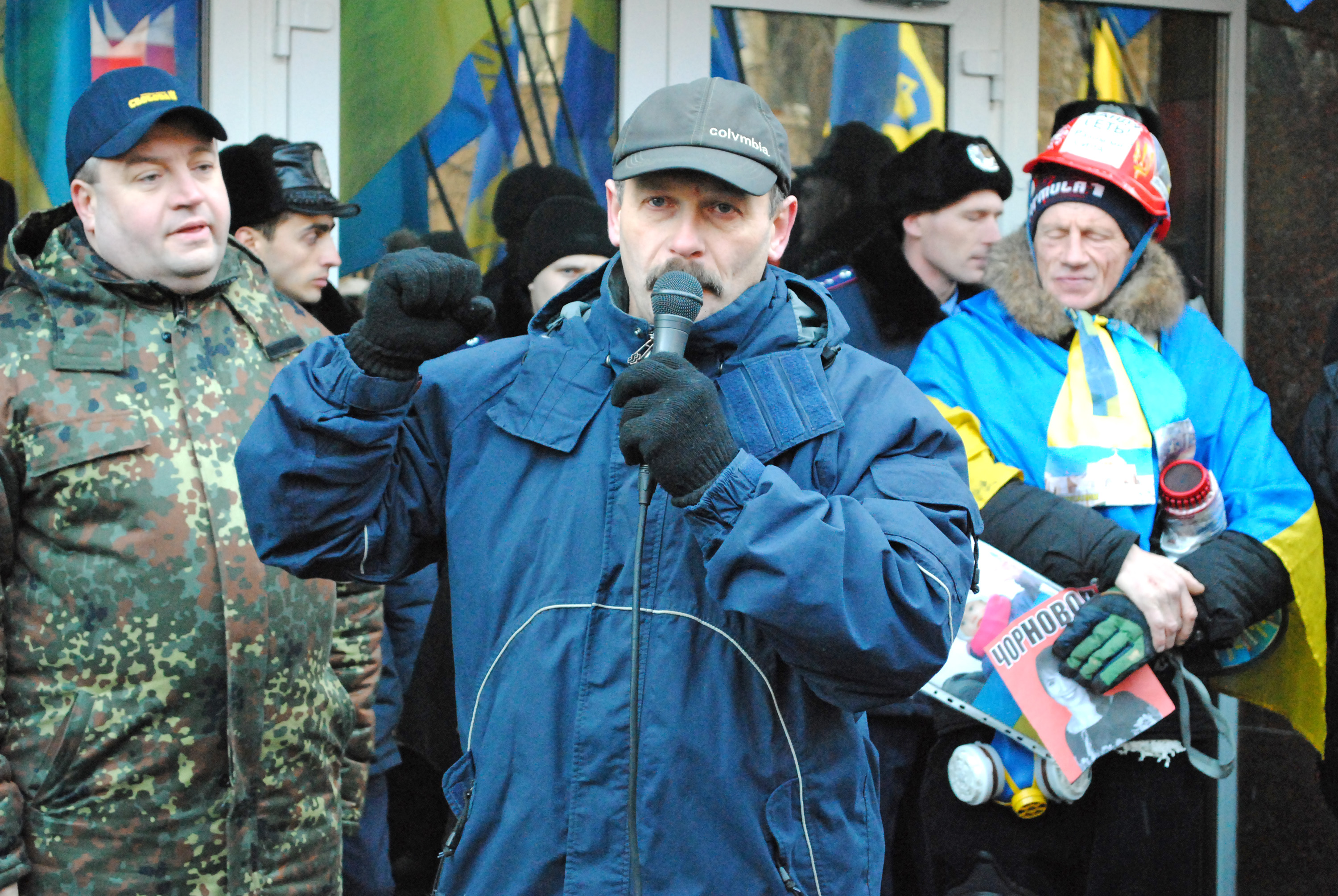 Український громадсько-політичний діяч, педагог, уродженець с. Нагірянка Чортківського району Олег Степанович Барна під час виступу на мітингу перед МВС у Києві 13 січня 2014 року.